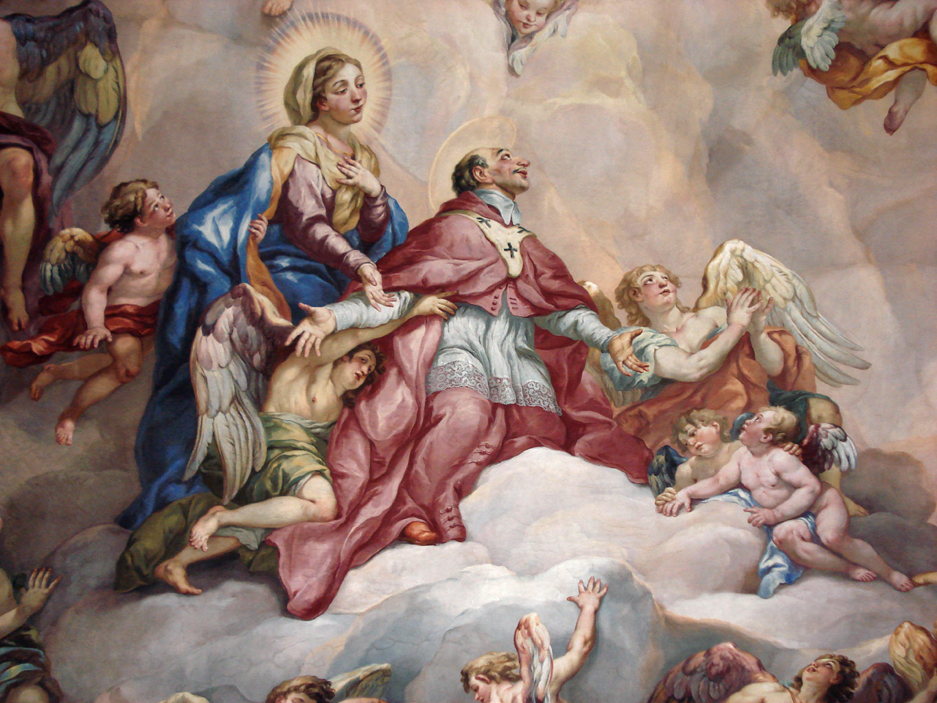 Dëst Bild weist en Deel vum Kuppelfresko aus der Wiener Karelskierch. Am Detail ass hei d'Himmelfahrt vum Hellege Carlo Borromeo ze gesinn.